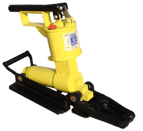 Рихтовщик гидравлический ГР-12Б